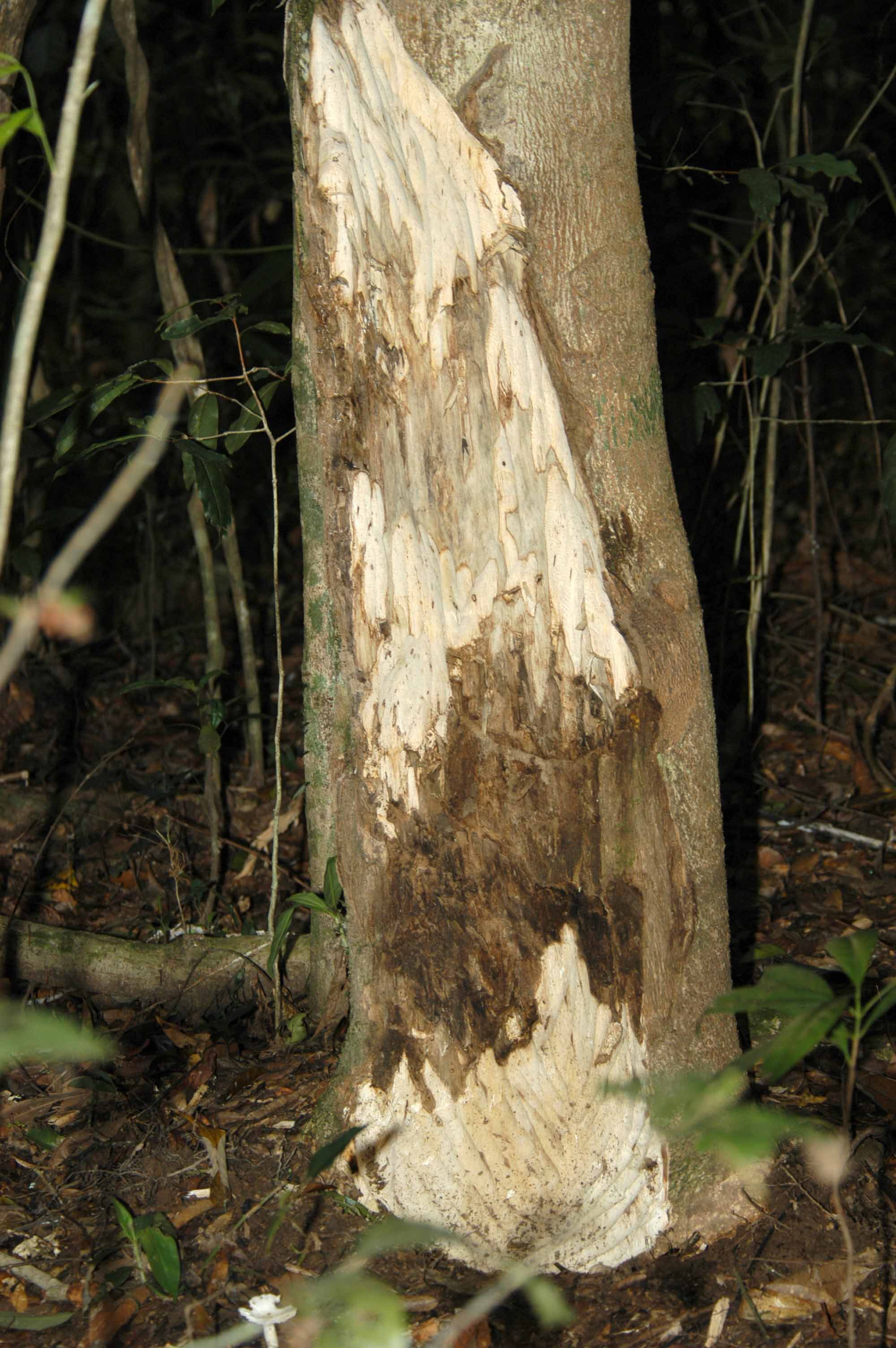 Aquilaria crassna, Khao Yai, Thaïlande. Des braconniers ont enlevé l'écorce du tronc par grattage, puis après quelques mois, ont prélevé le bois malade et noirci pour en distiller les extraits et produire de l'encens.Dérangés, ils n'ont pas achevé leur récolte.